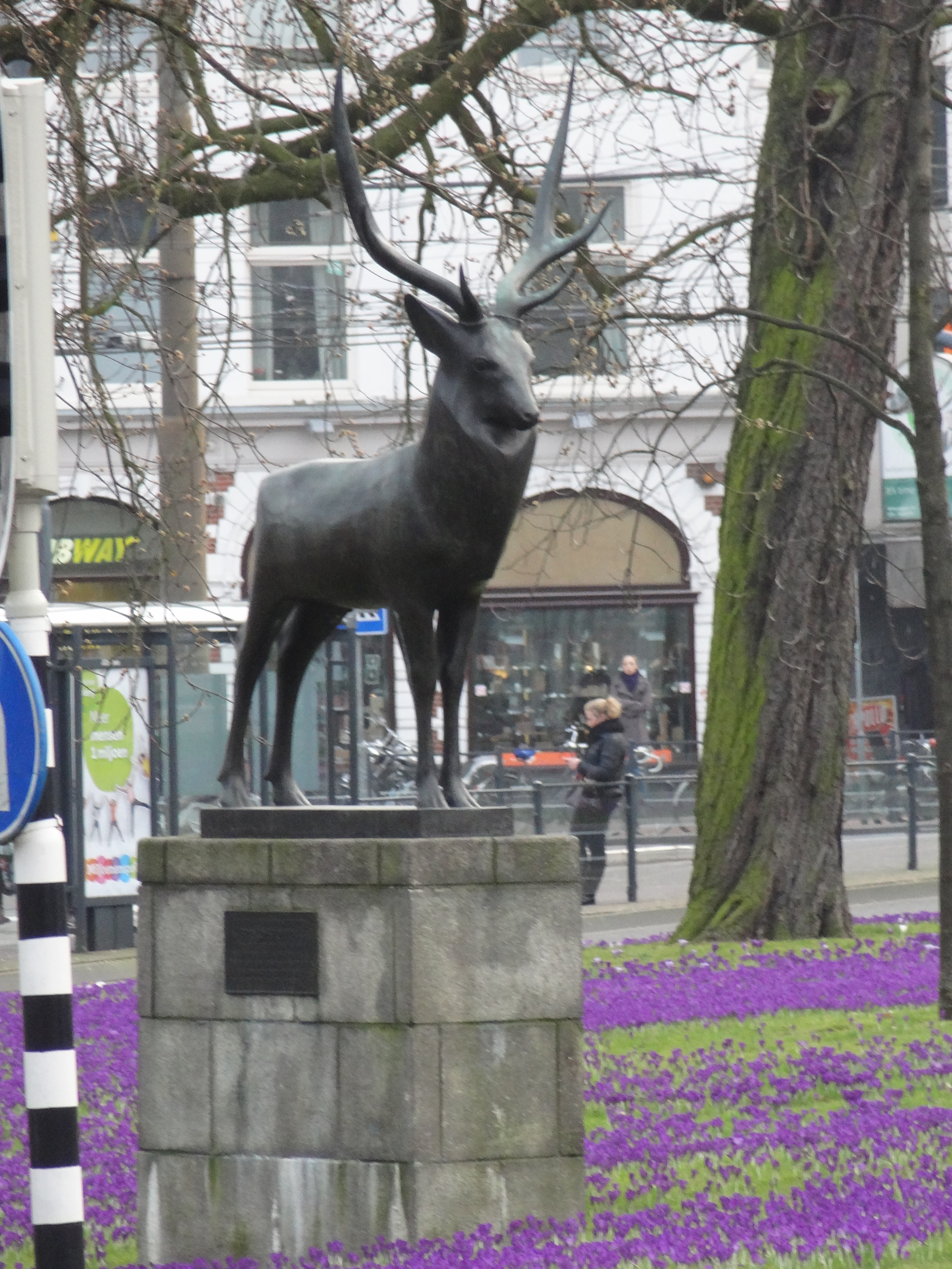 Het beeld Le Grand Cerf van François Pompon op het Willemsplein in Arnhem